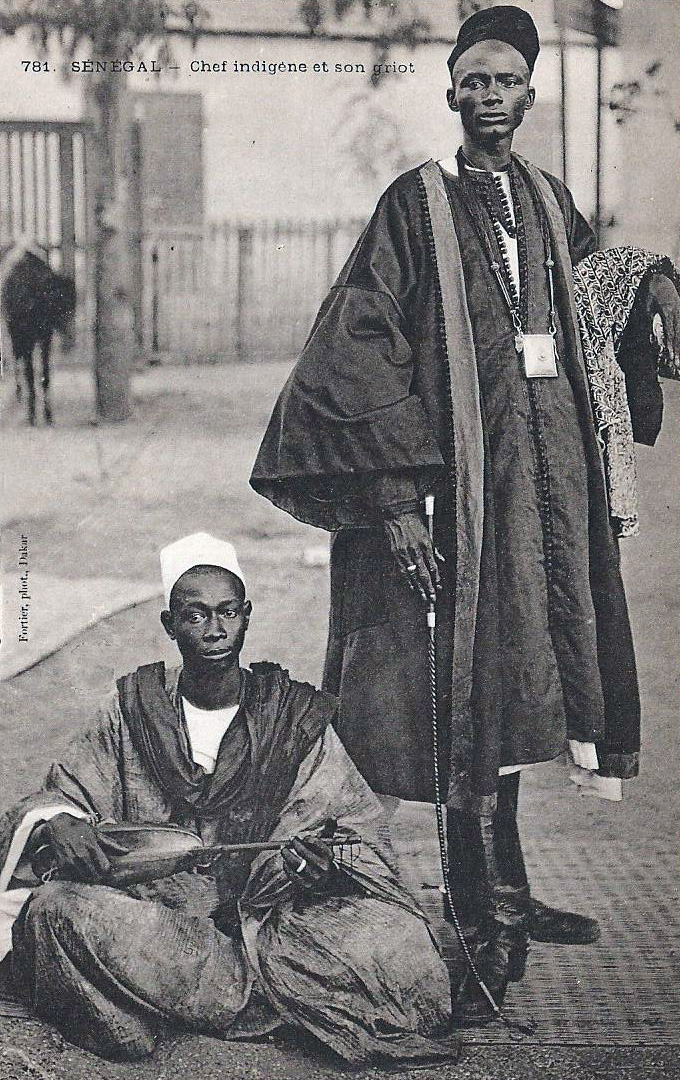 François-Edmond Fortier, Chef indigène et son griot. Afrique Occidentale - Sénégal.